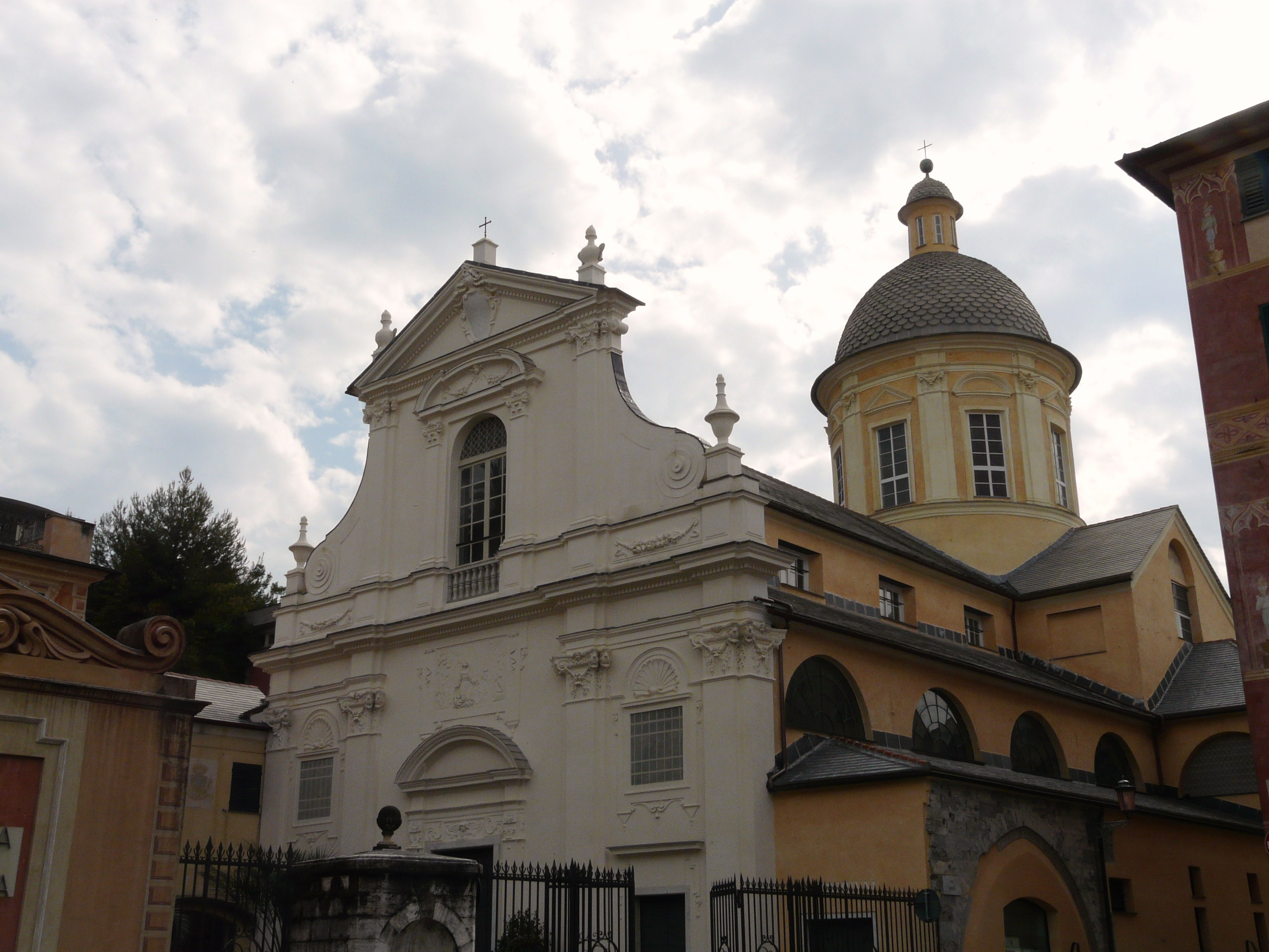 L'ex complesso della chiesa di San Francesco (oggi auditorium), Chiavari, Liguria, Italia